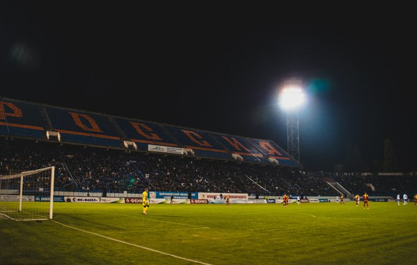 19 тур. "Факел" - "Арсенал". 16 200 зрителей.